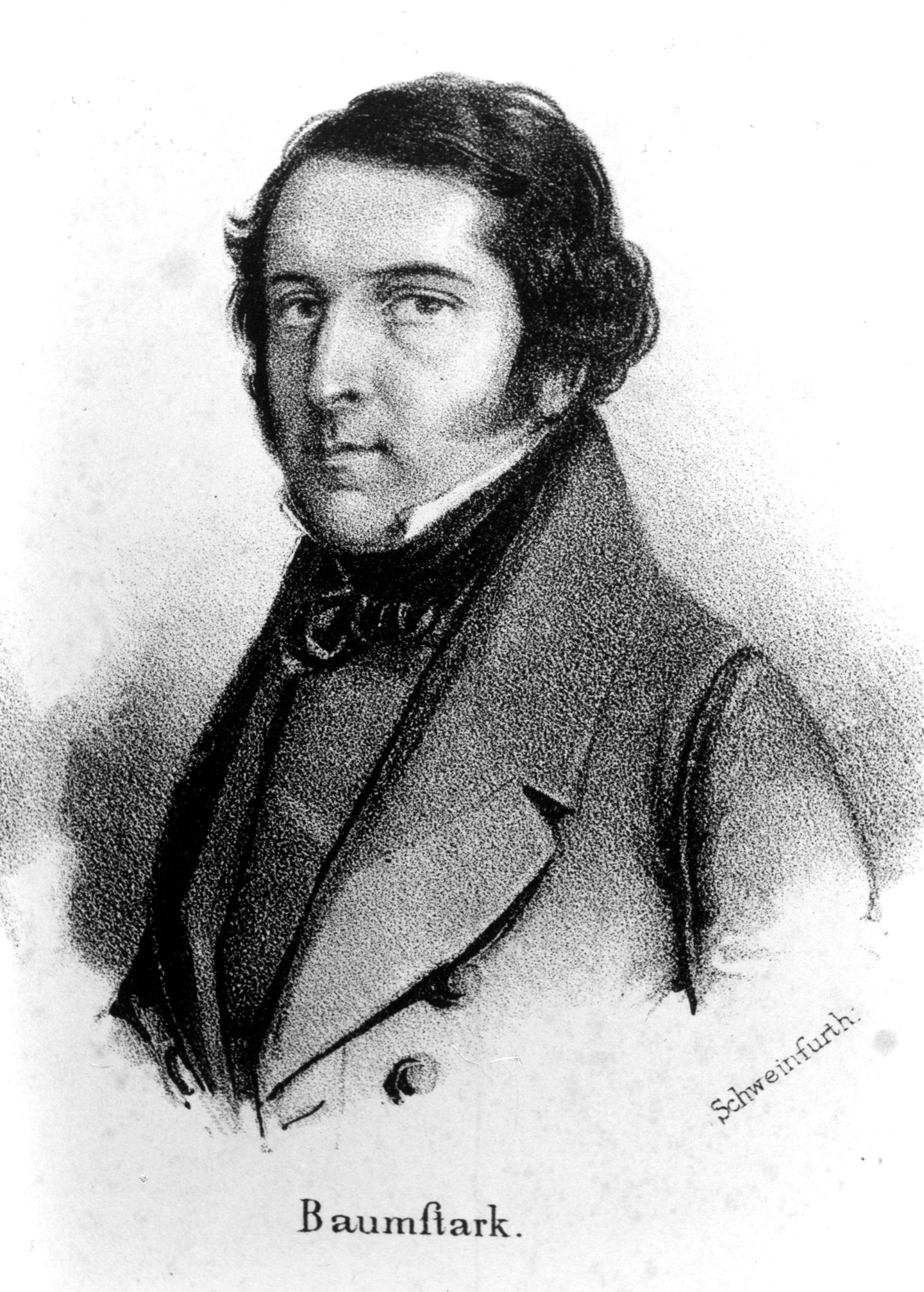 Anton Baumstark (1800–1876), Professor für Klassische Philologie an der Universität Freiburg. Zeichnung von Ernst Schweinfurth (1818–1877).